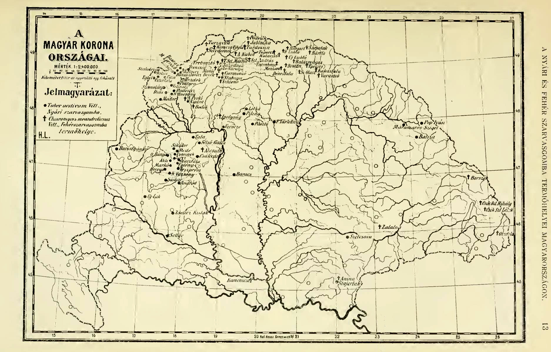 Dr Hollós László térképe a nyári és fehér szarvasgomba termőhelyeiről